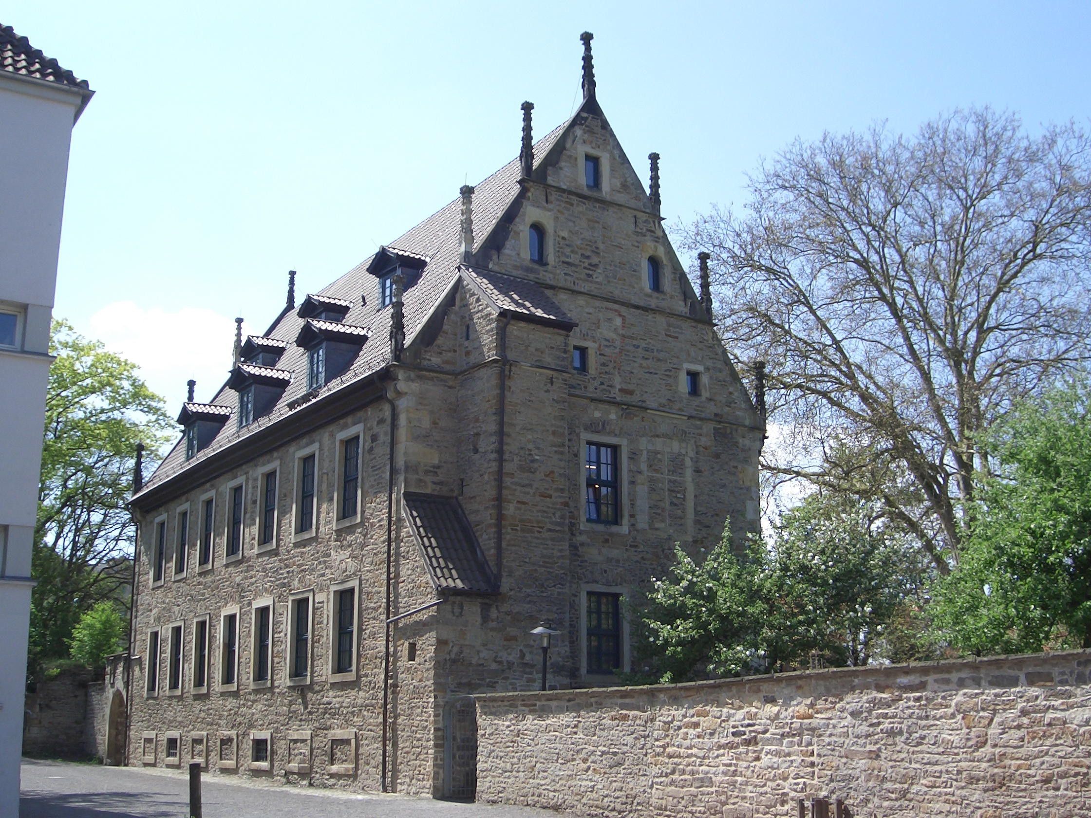 Städtische Bibliothek, Landsbergscher Hof, Stadthagen